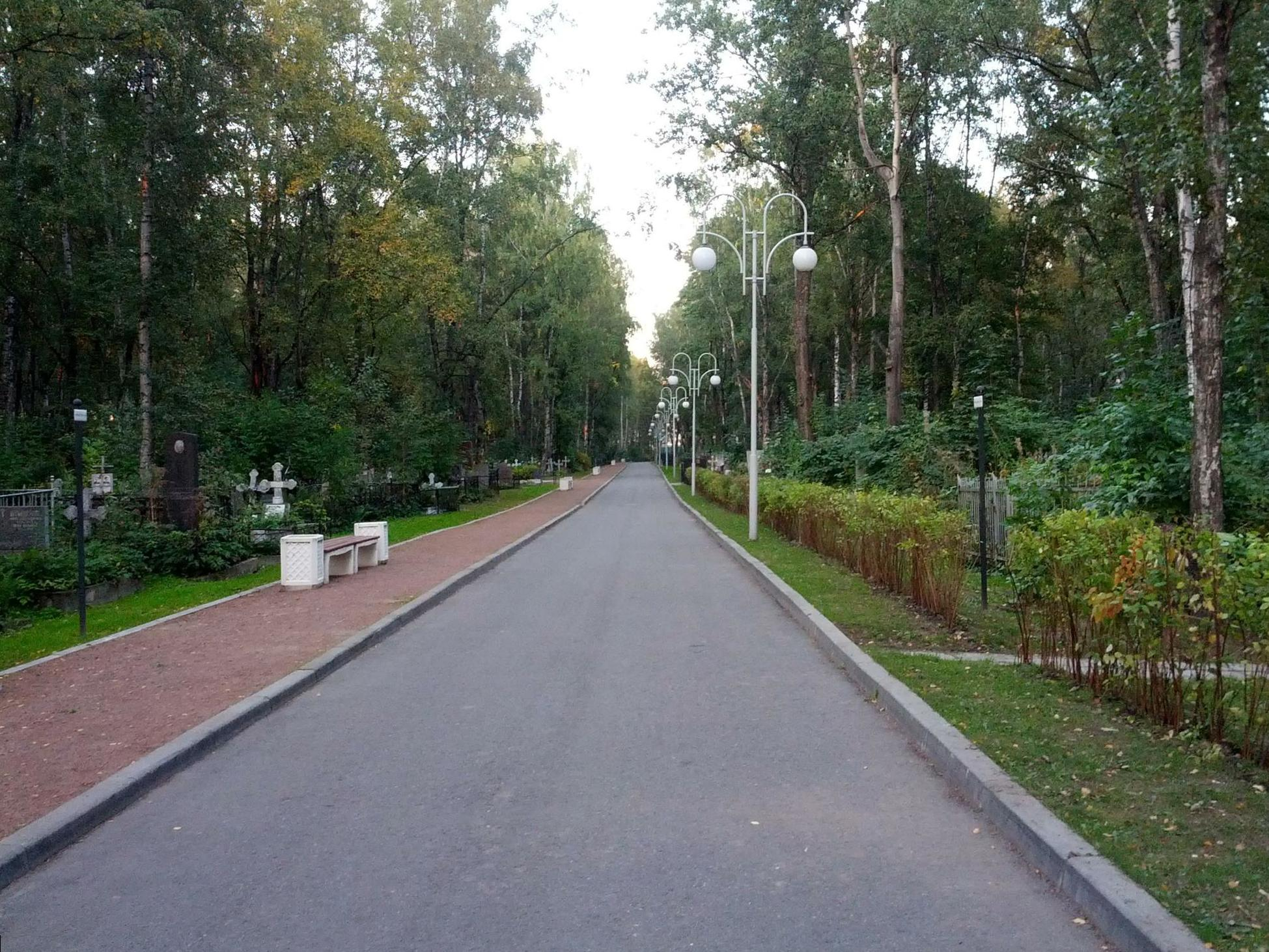 Октябрьская набережная, Невский округ